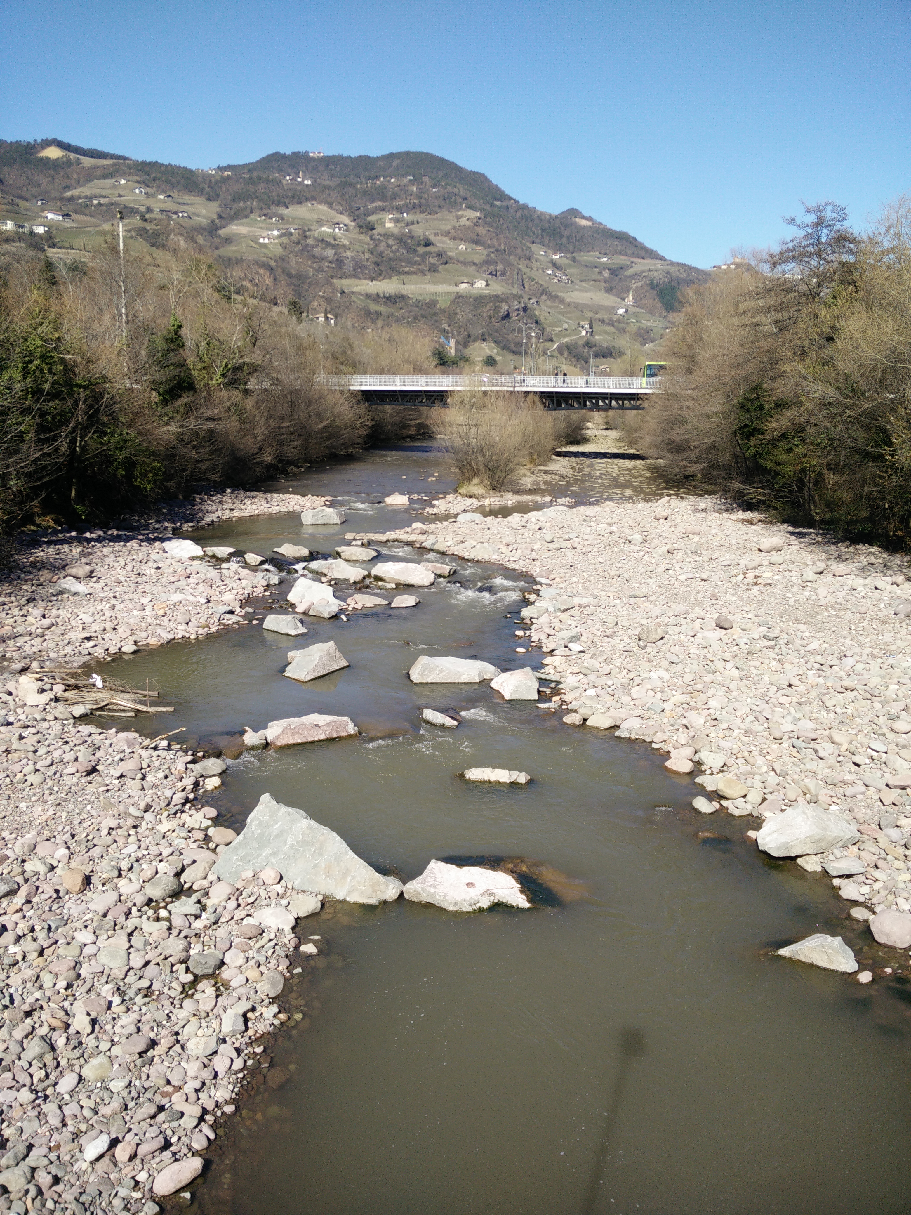 Torrente Talvera dopo i lavori di rinaturalizzazione del 2015-2016 a monte del ponte ciclopedonale del Lungotalvera S. Quirino.